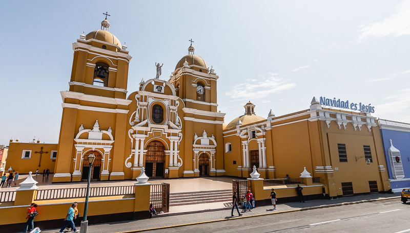 Trujillo, La Libertad, Perú